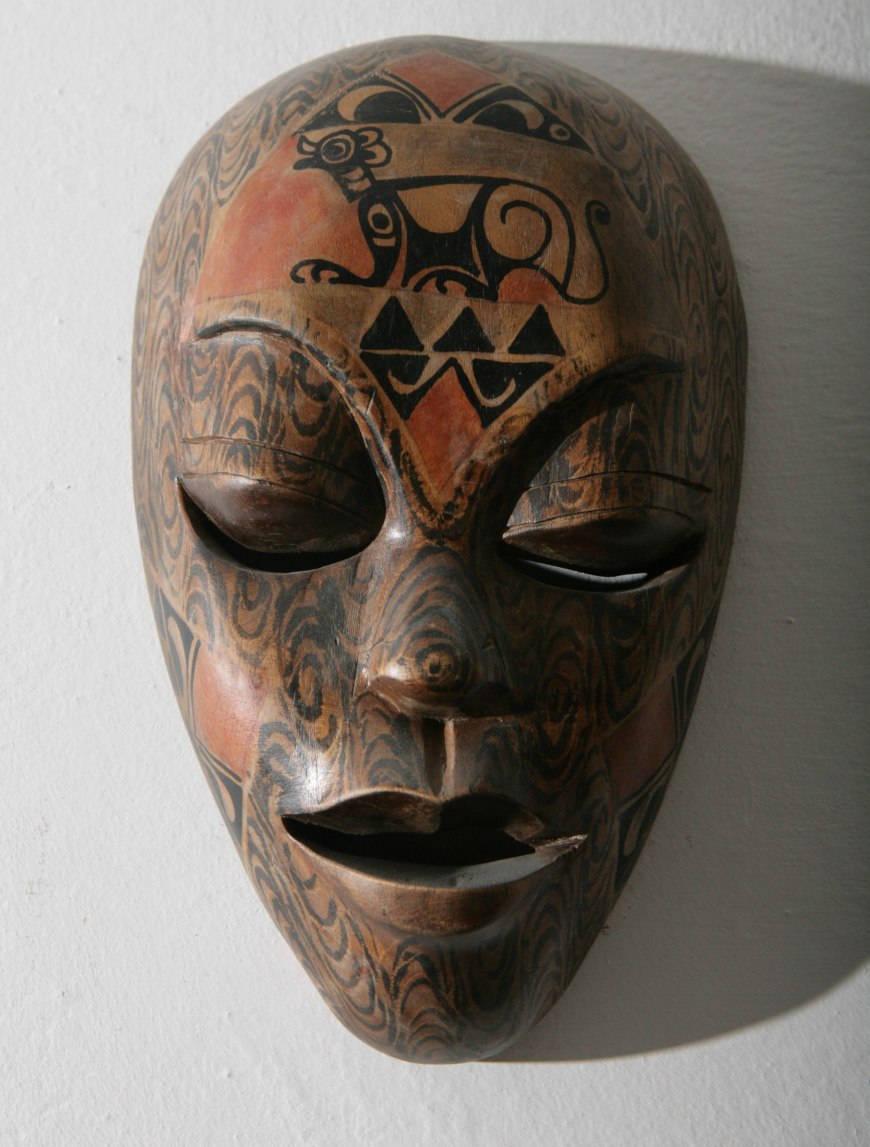 Maska afrykańska (fot.: Cezary Piwowarski)